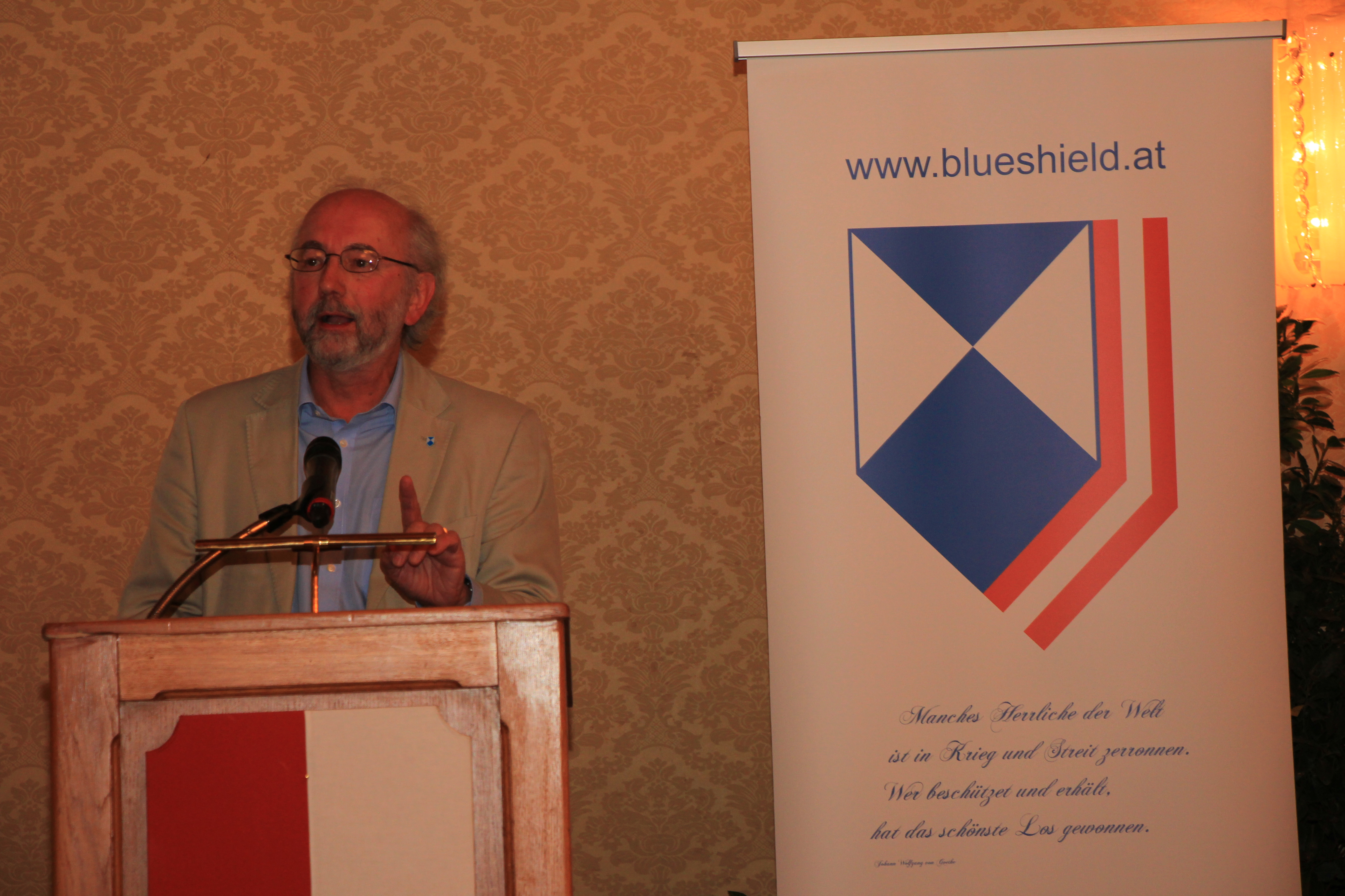 Generalversammlung der Organisation Blue Shield International im Wiener Rathaus